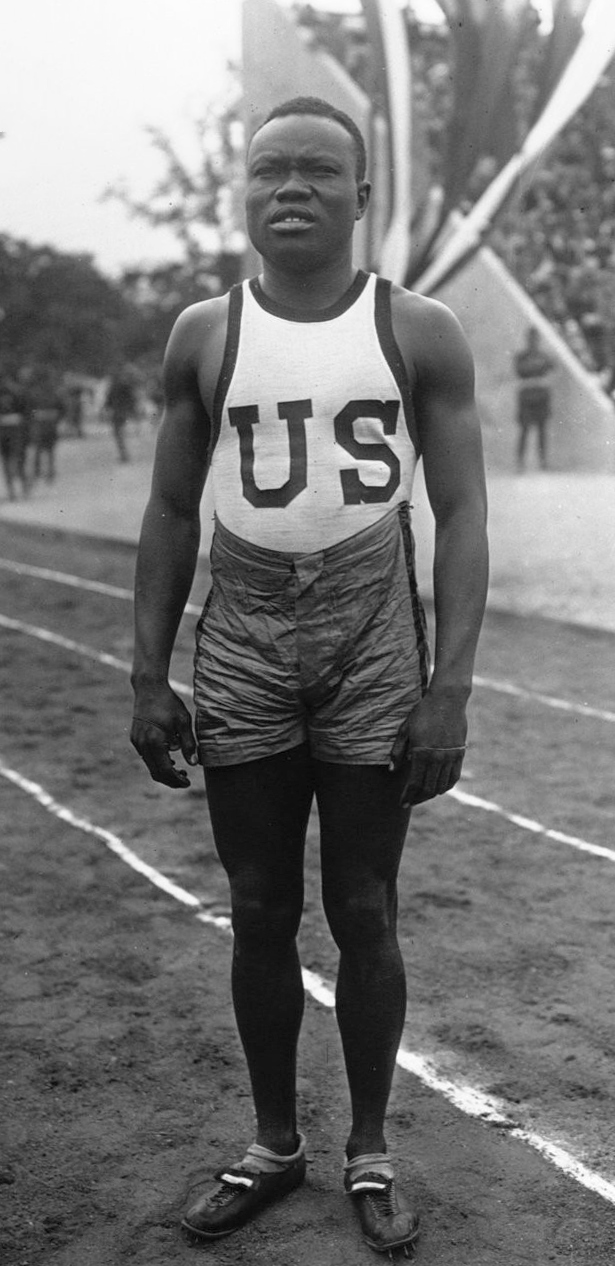 Le stade Pershing : Butler (américain) : [photographie de presse] / Agence Meurisse